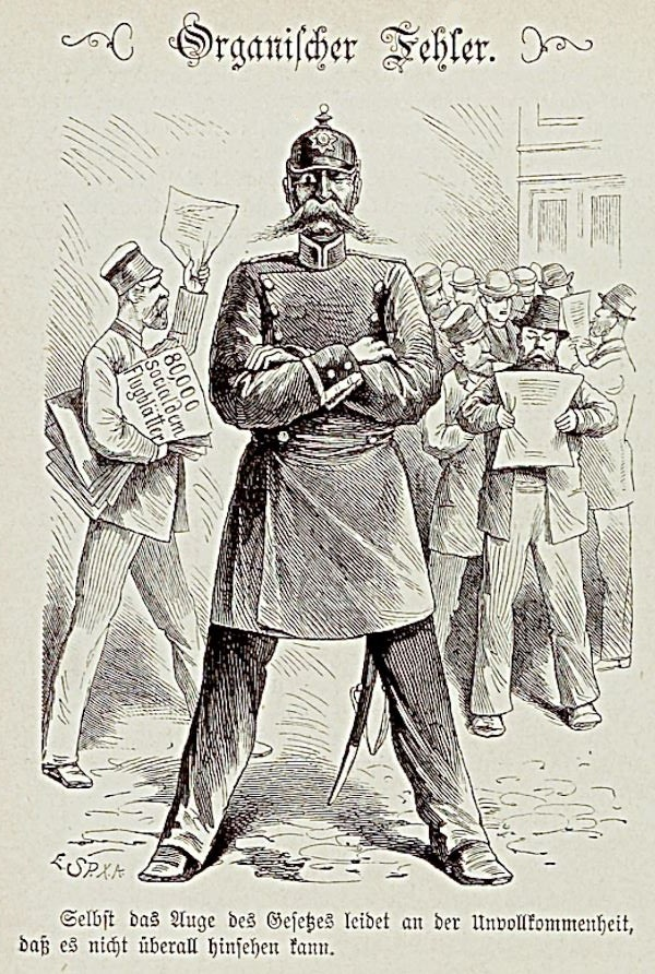 Kladderadatsch 1. August 1886 / Verteilung sozialistischer Literatur im Rücken der Polizei.